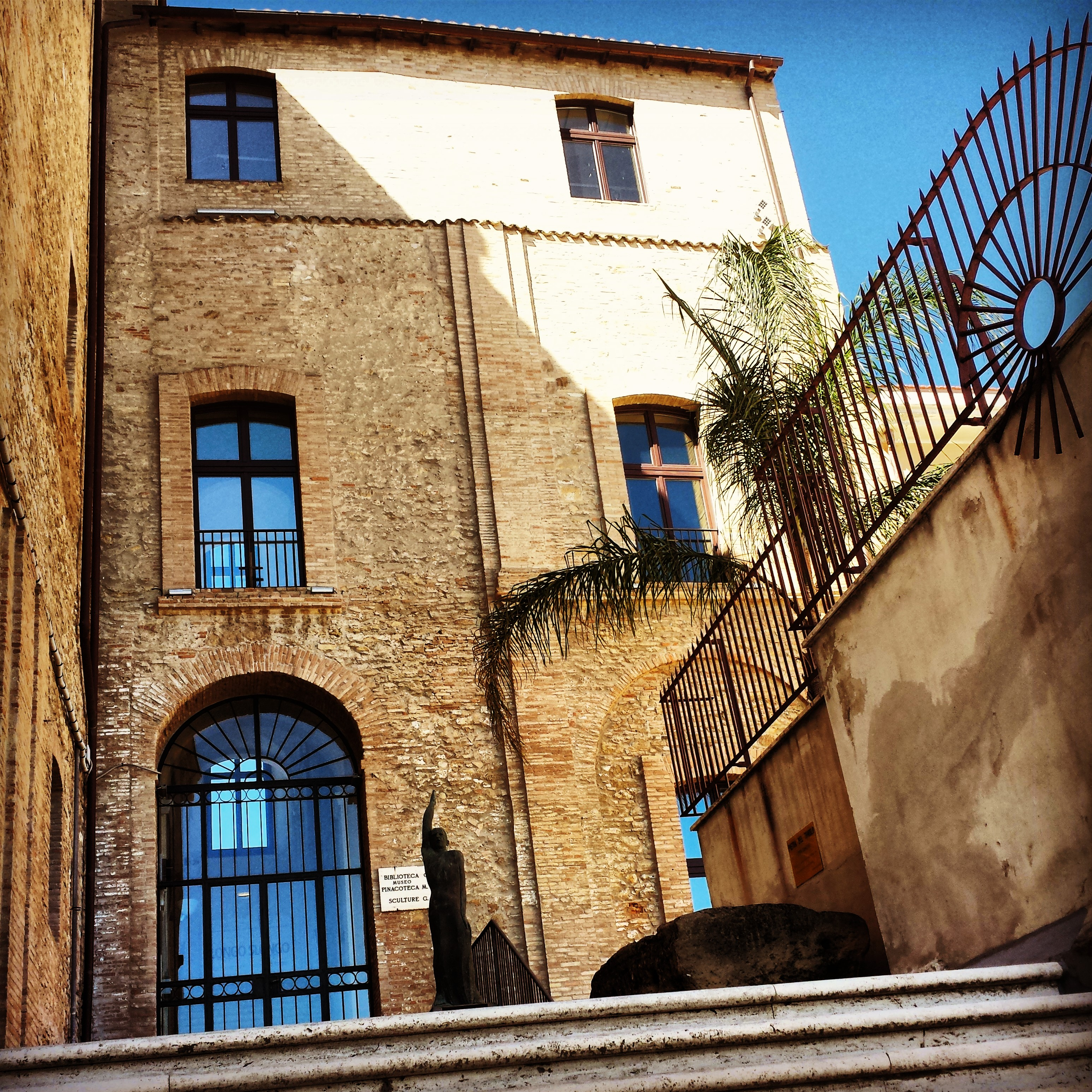 Facciata del palazzo Farnese, Museo Civico di Arte Contemporanea. Ortona (CH) 2013